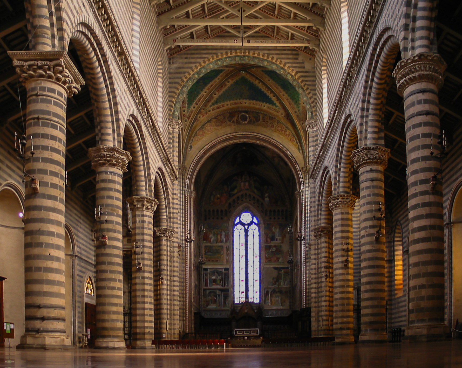 Dom von Orvieto, Innenansicht